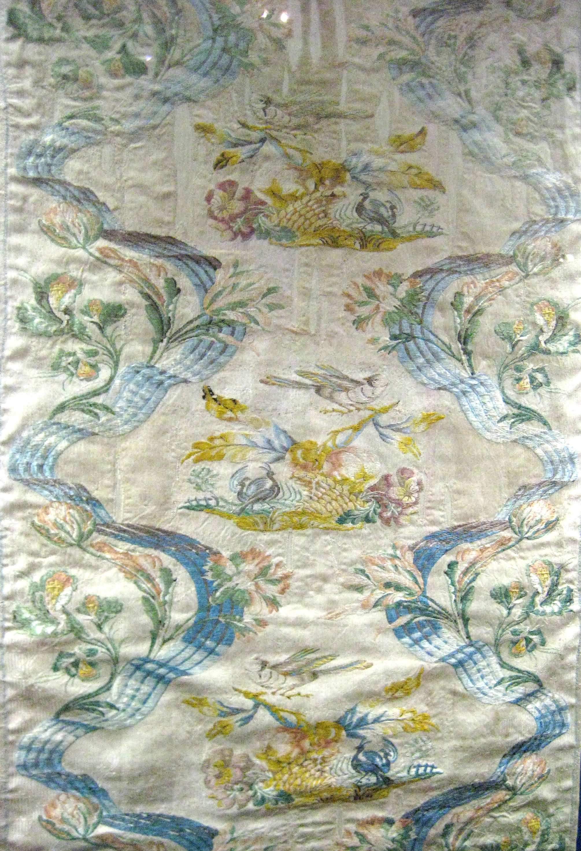 Ткань шелковая объярь. Франция. Начало 18 века. Цветной шелк, серебряная нить, ручное ткачество. ГИМ